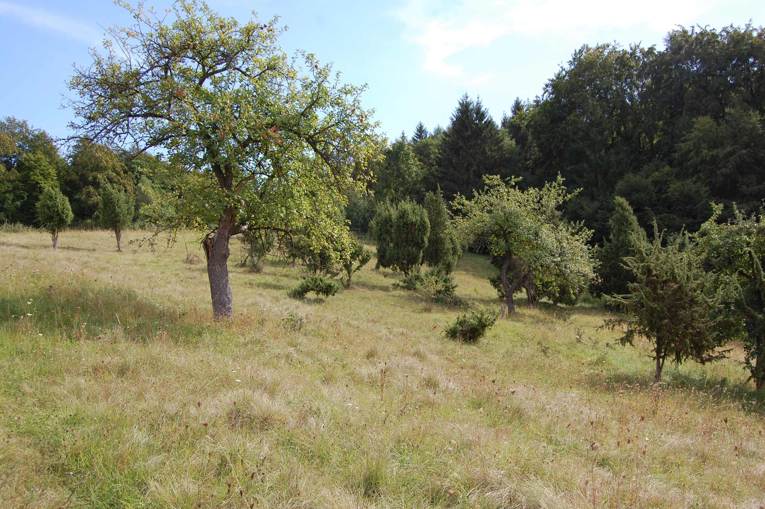 Im NSG Ostheimer Hute, September 2016